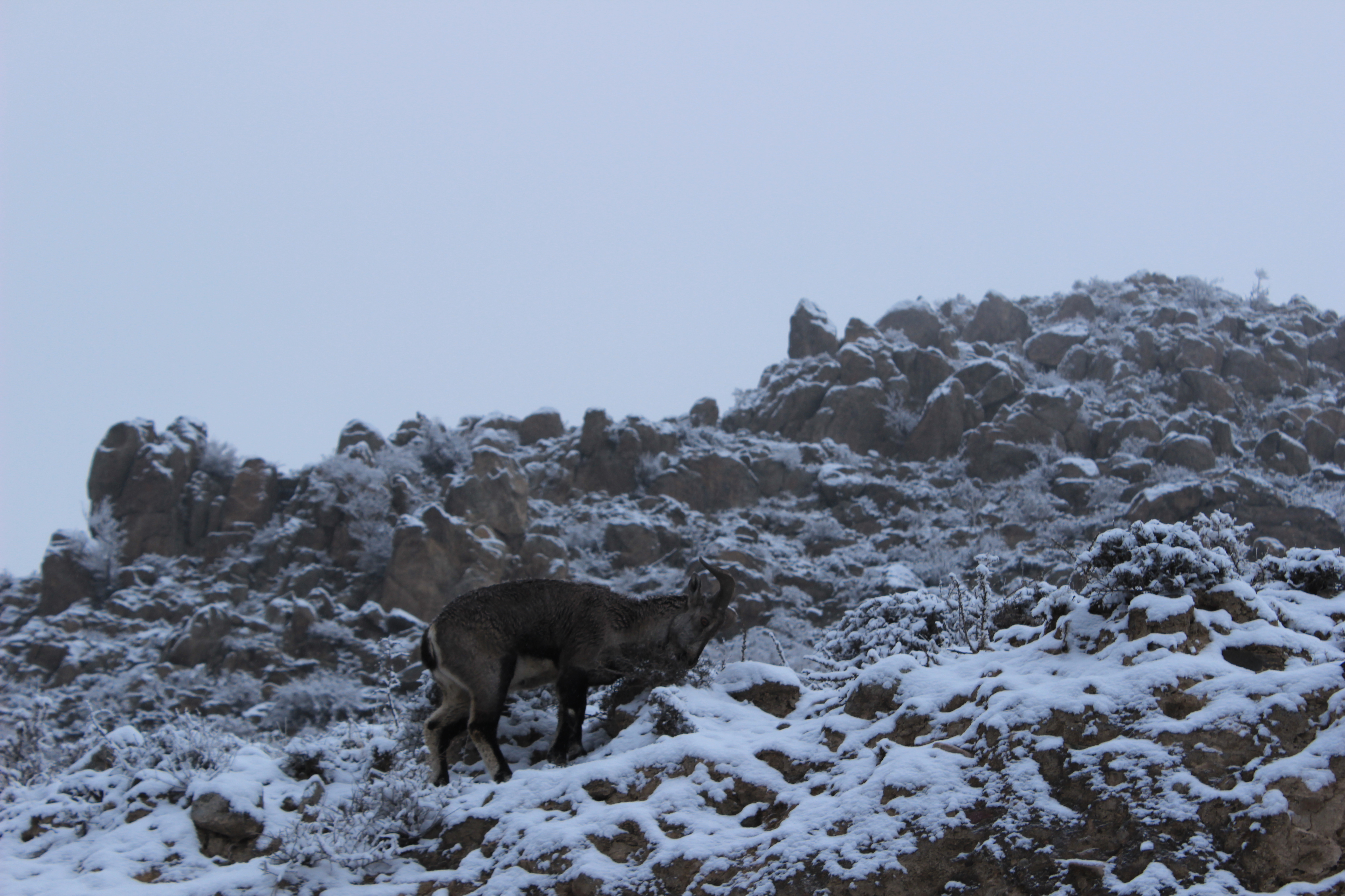 冬天贺兰山上的野生贺兰山岩羊，国家二级保护动物。宁夏贺兰山国家级自然保护区是全球岩羊分布密度最大的地区之一。Wild Helan Mountain Rock Sheep on Helan Mountain in Winter.Ningxia Helan Mountain National Nature Reserve is one of the regions with the highest density of rock sheep in the world。